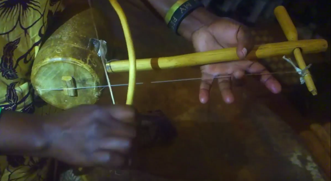 Uganda Endingidio.